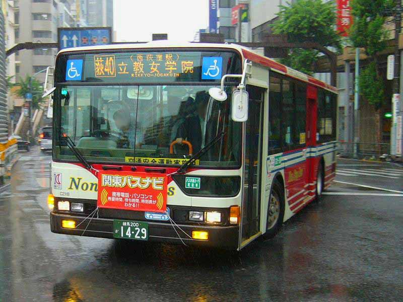 登録番号：練馬200か14-29 関東バス青梅街道営業所所属 車番C2118 三菱ふそう・エアロスター PJ-MP37JM